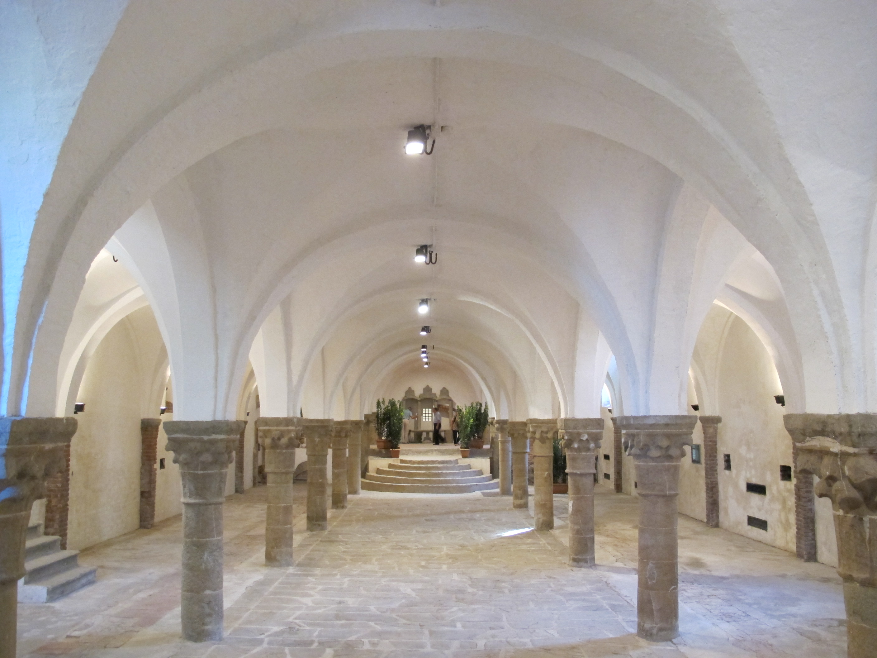 Badia a settimo, antico granaio